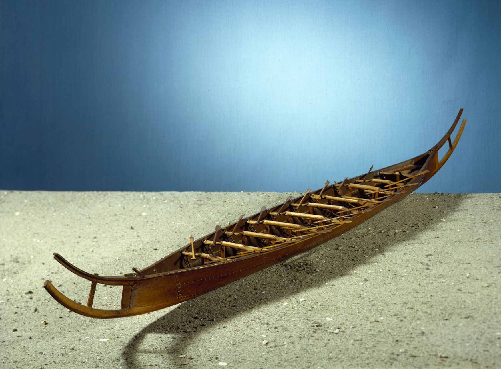 Model af Hjortspringbåden.